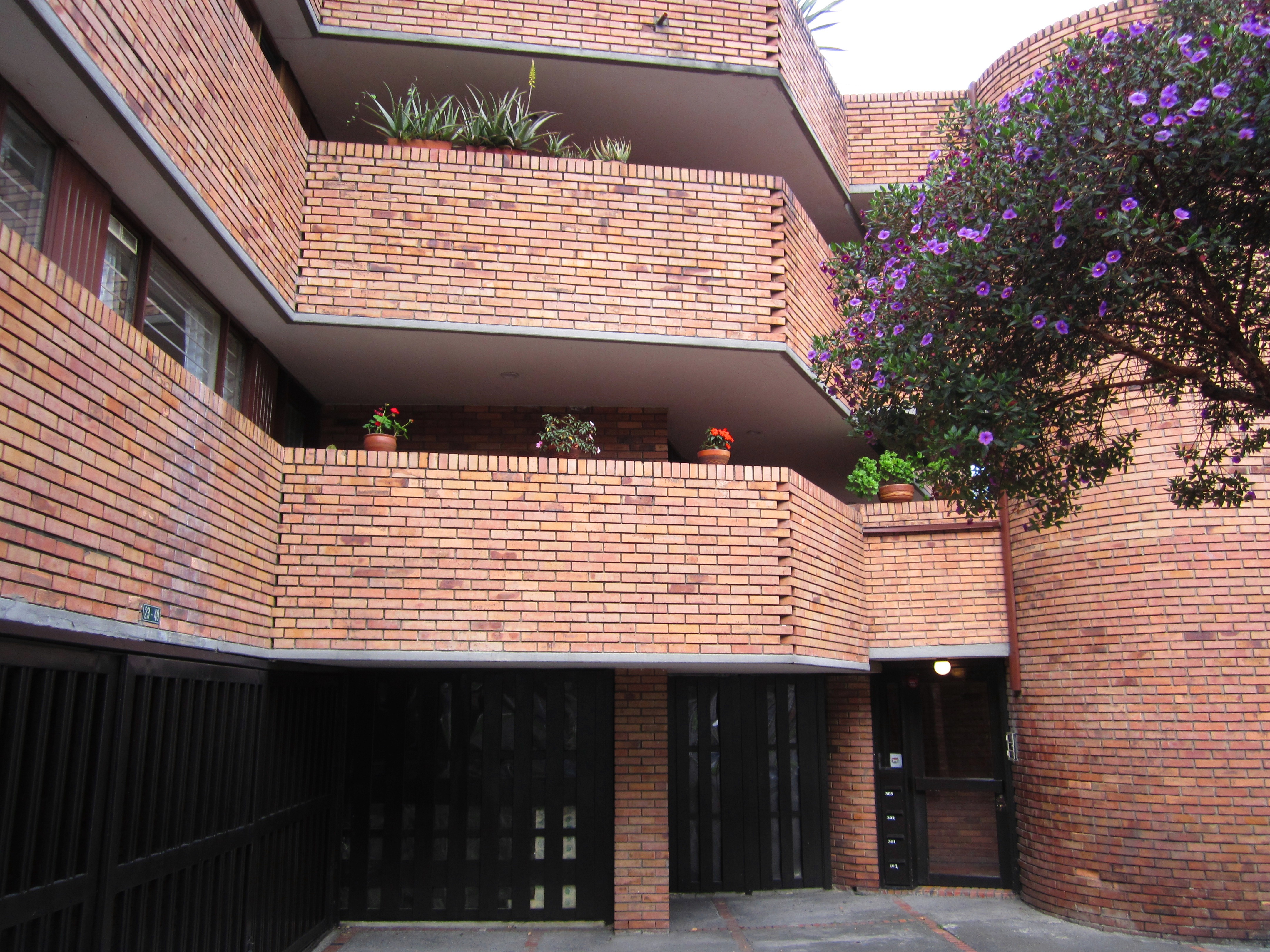 Conjunto Residencial El Polo, barrio Antiguo Country, localidad